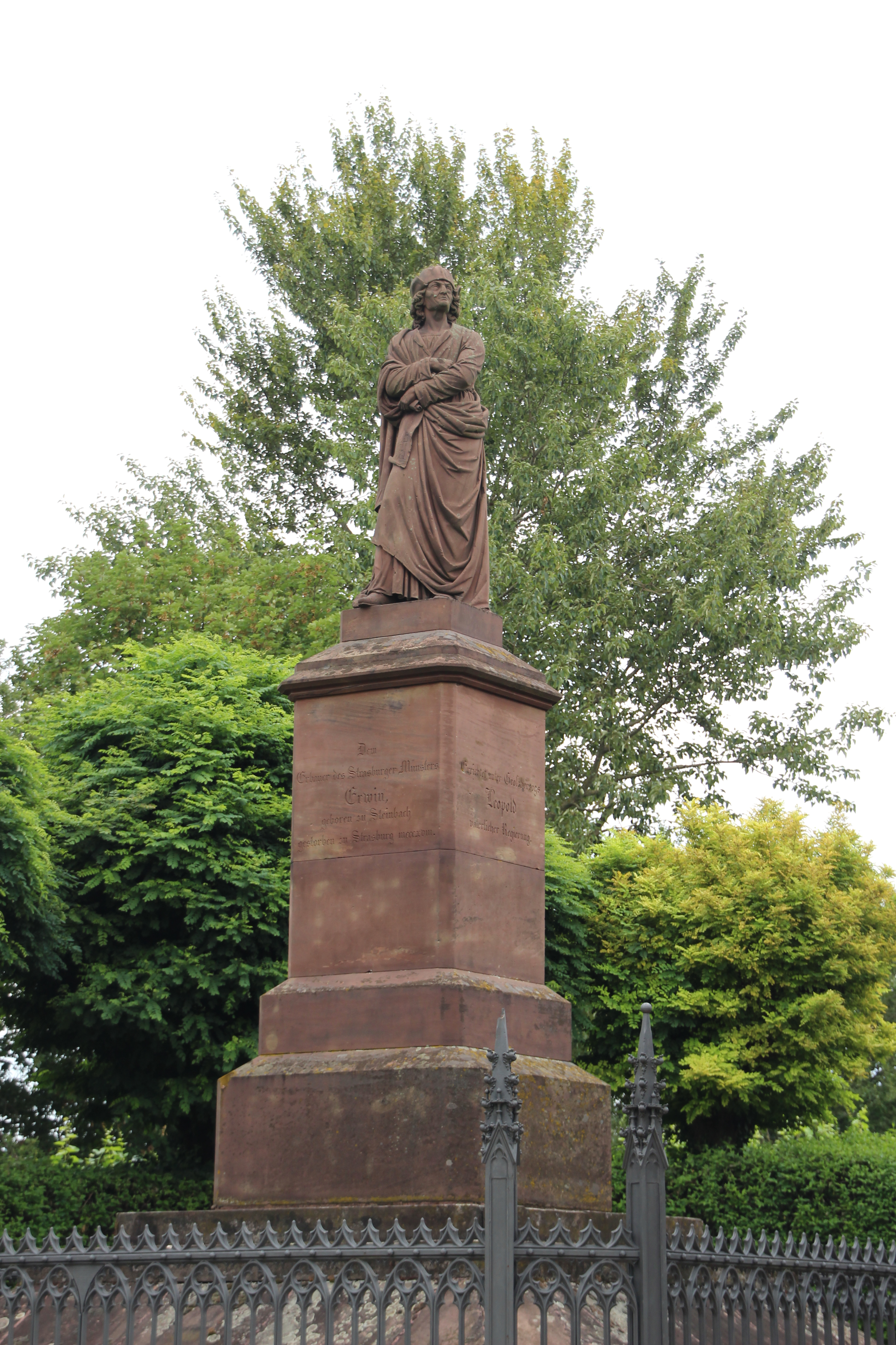 Bildinhalt: Statue Erwin von Steinbachs in Steinbach, oberhalb des Friedhofs, von Andreas Friederich, enthüllt am 29. August 1844. Mit Sockel und Zaun Aufnahmeort: Steinbach, Deutschland